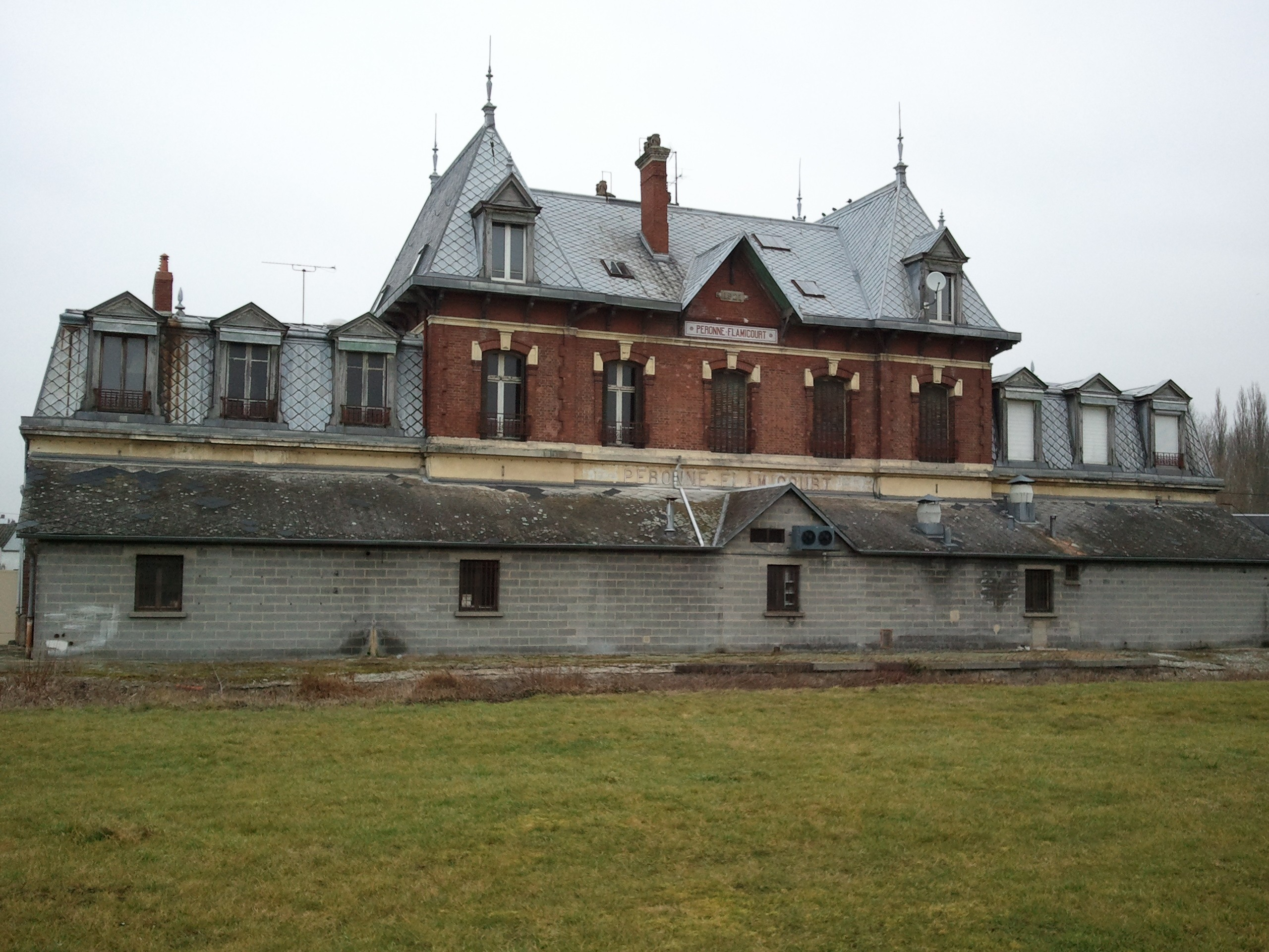 Péronne - Flamicourt. Le quai subsiste, encombré par une extension en parpaings. On ne distingue pas d'autres ouvrages ferroviaires